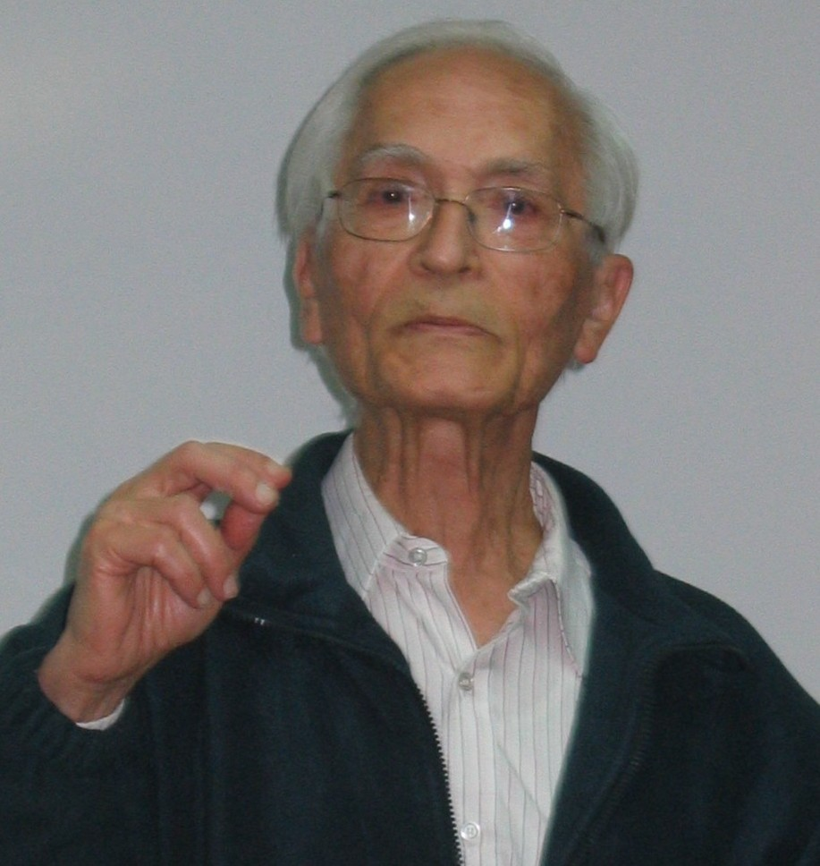 Jacob Ziv, lors d'une conférence